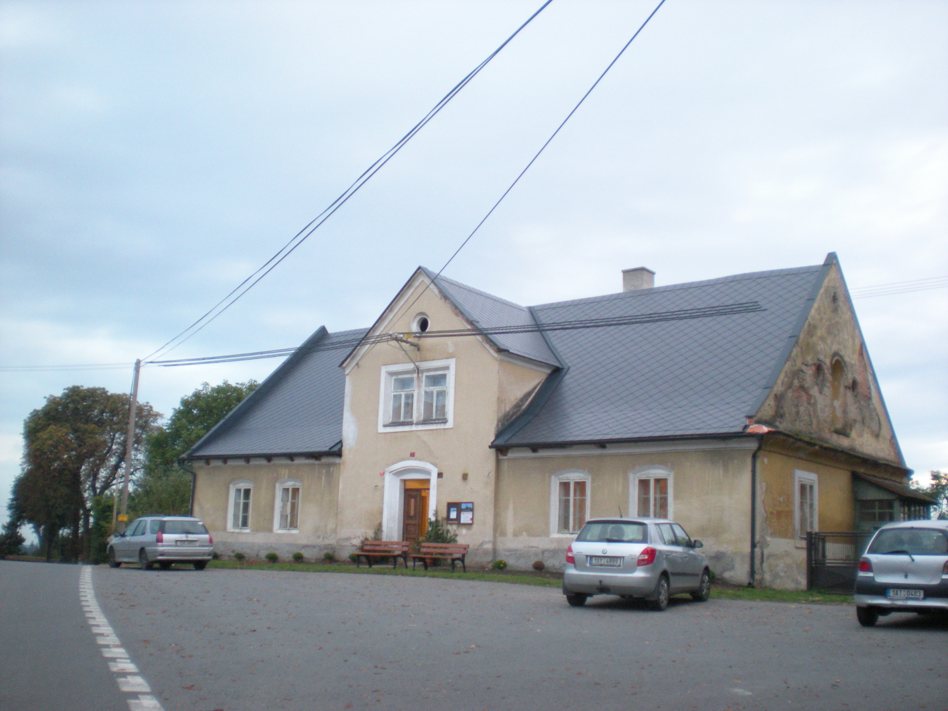 Fara, Čestín 1, Čestín.